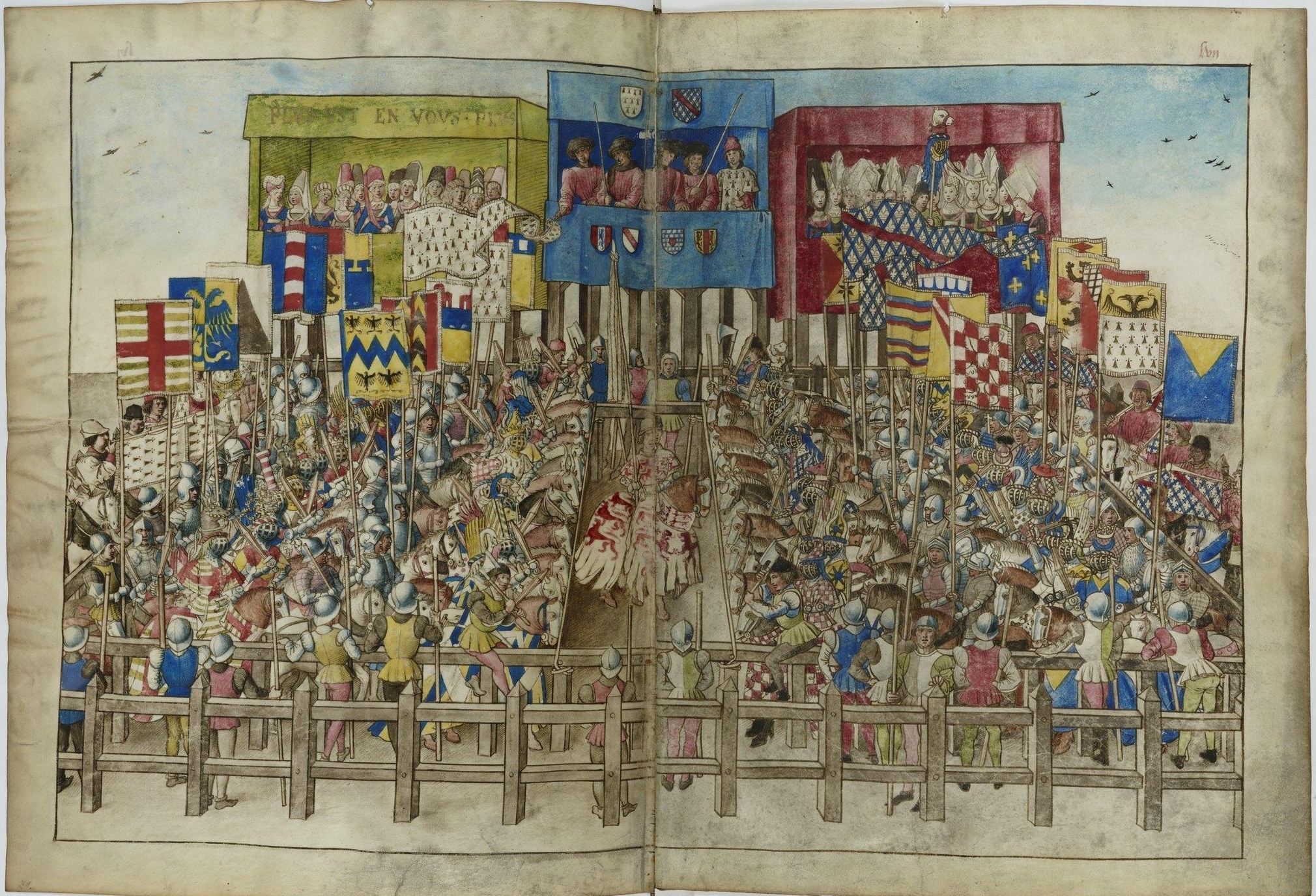 Turnierbuch des René von Anjou, Paris, Bibliothèque nationale, Ms. fr. 2693